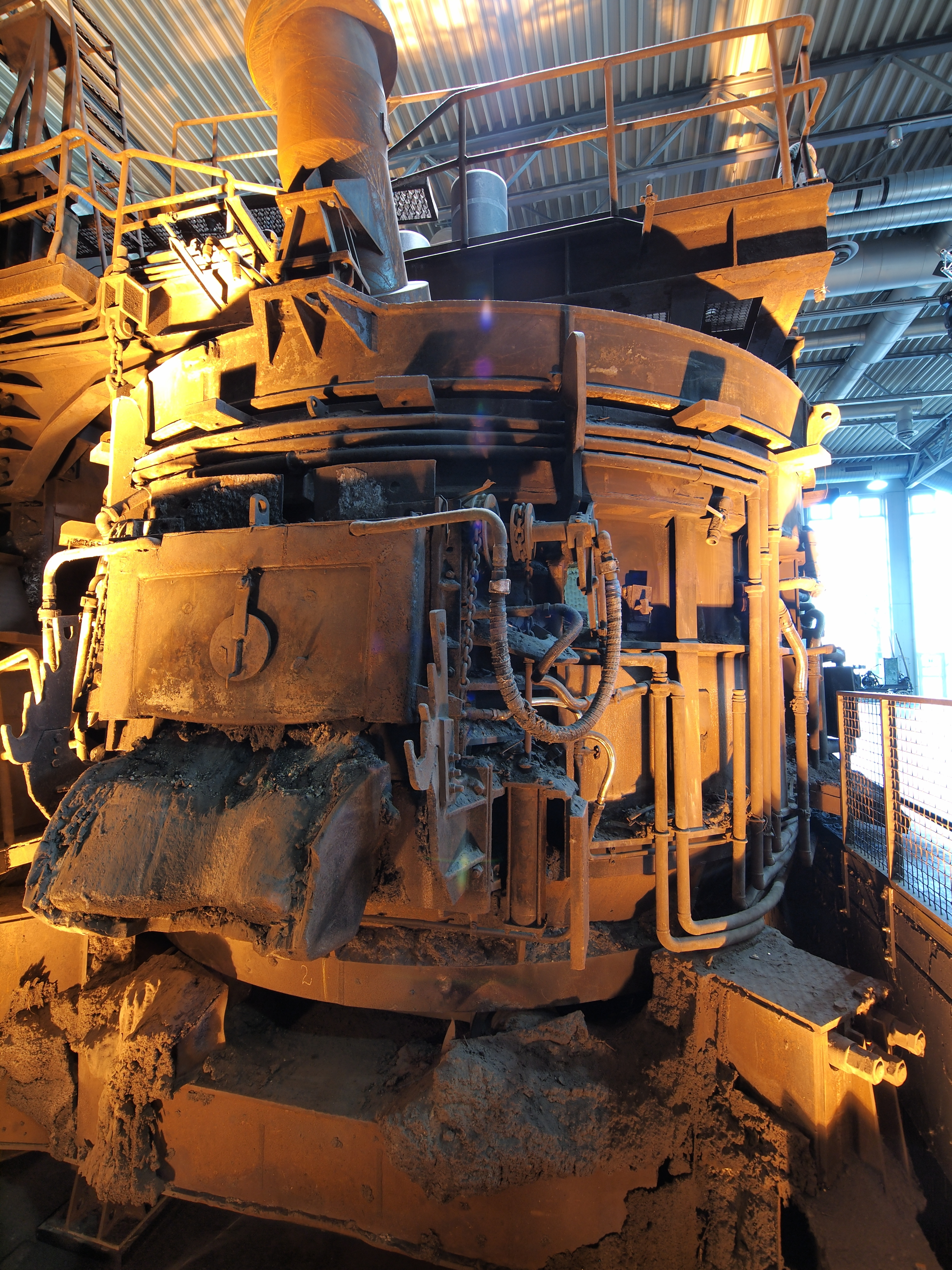 DASA - Elektrolichtbogenofen zur Stahlerstellung aus Schrott - Arbeiten in Hitz, Lärm und Staub